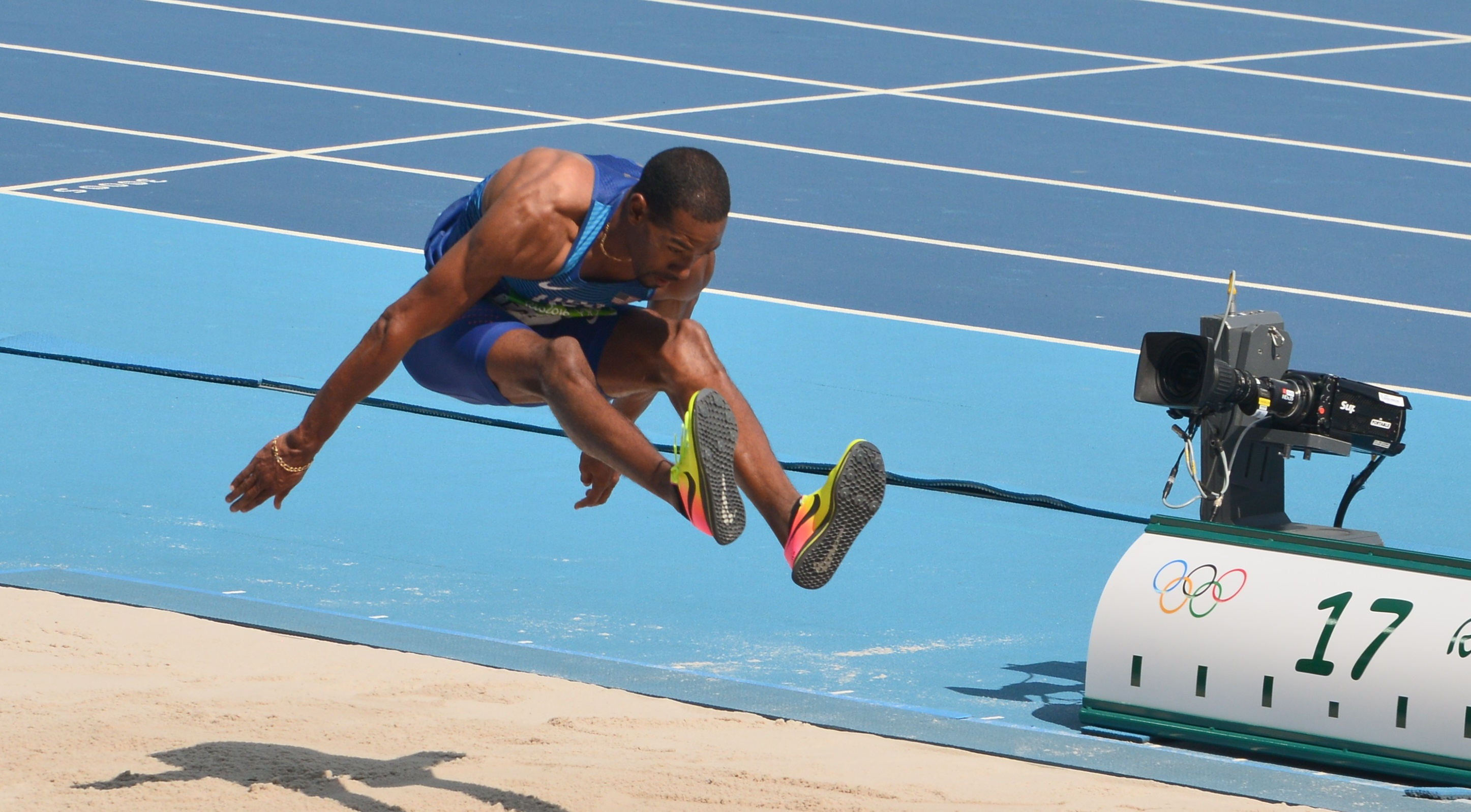 Christian Taylor dans son saut de 17,77 (4ème saut lors de la finale) à Rio 2016